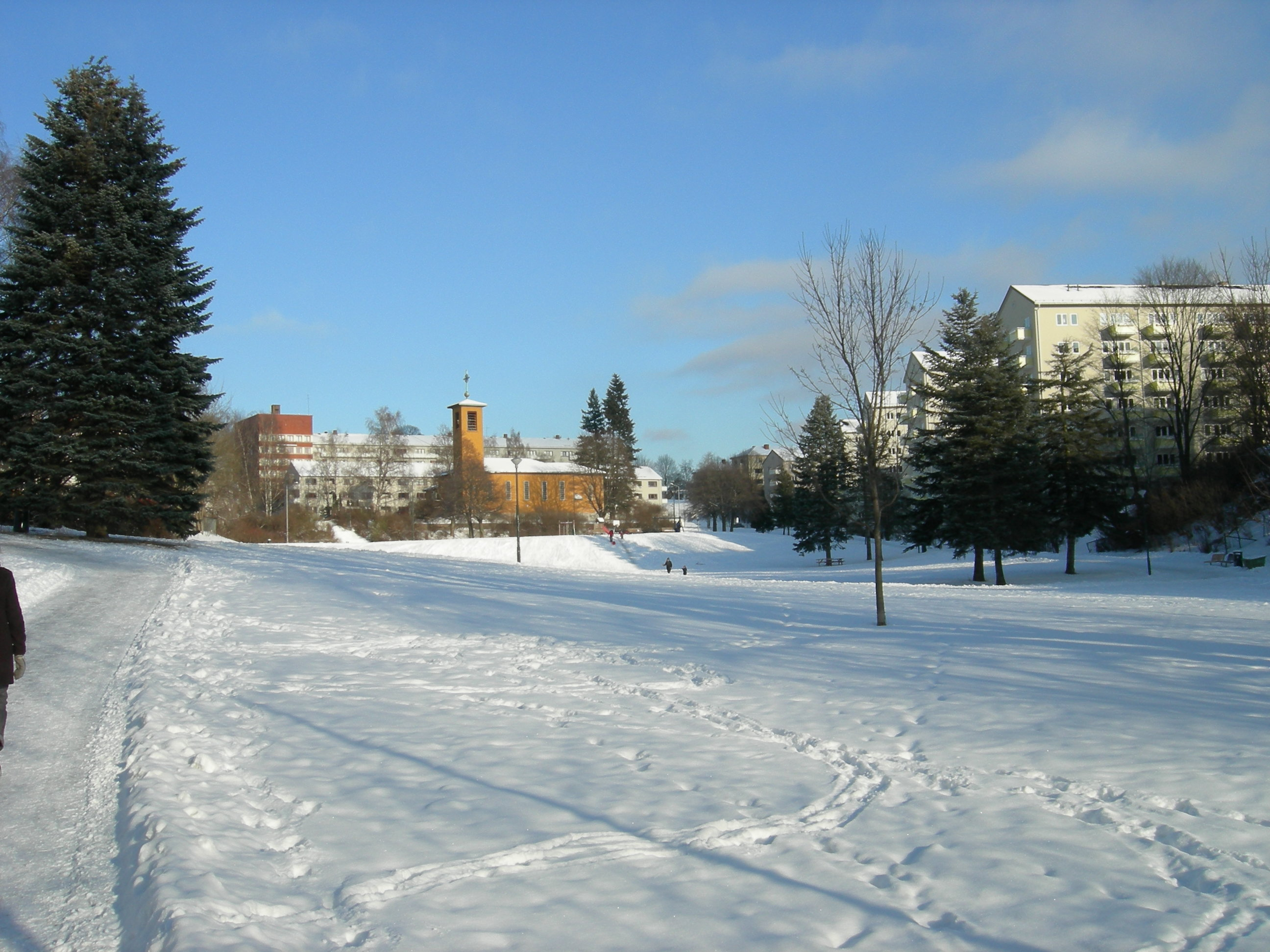 Iladalen park, sett mot kirken (nord)